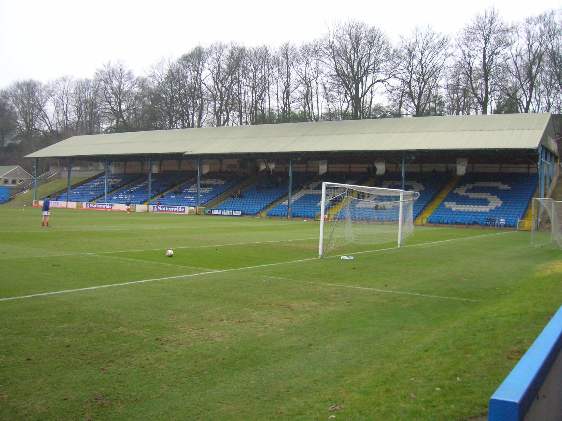 Taken during Halifax vs Kidderminster Harriers 04/02/2006